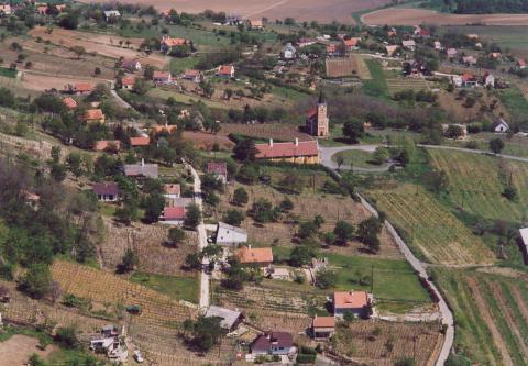 Hegymagas, Hungary, aerialphotography